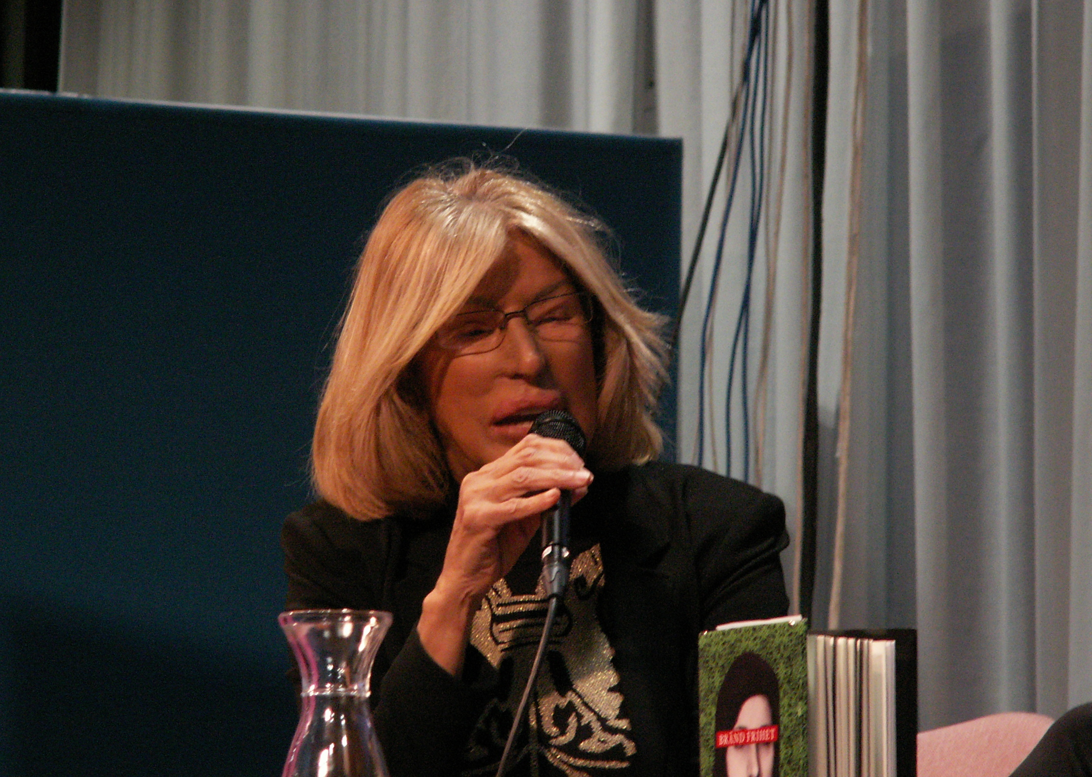 Maria Rashidi på Globala Torget, Bokmässan 2018.